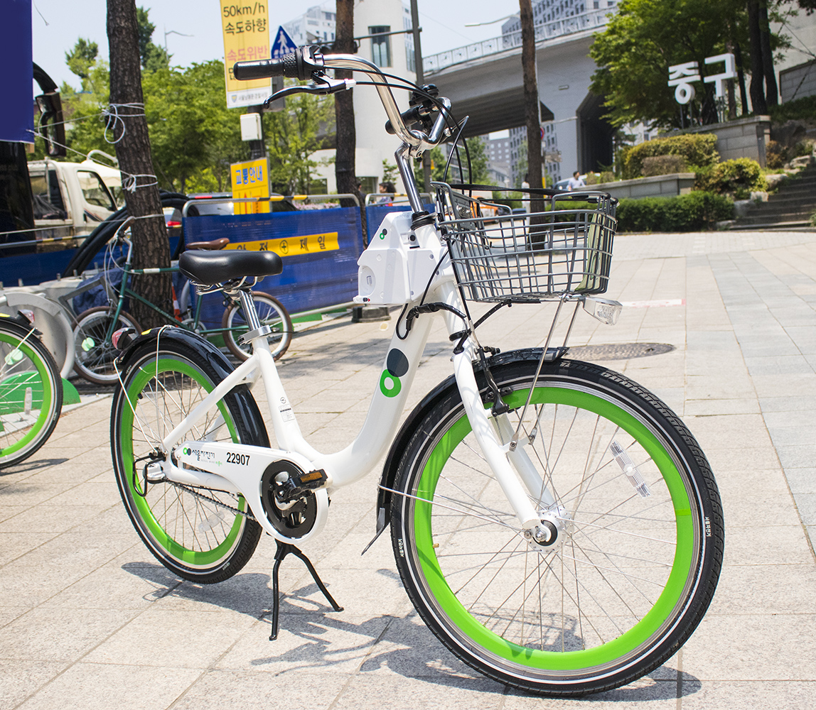 서울자전거 따릉이, 2019년에 도입된 자전거 22907호의 모습.